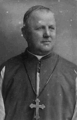 František Borgia Krásl (1844 - 1977), Český římskokatolický kněz, církevní historik a spisovatel.